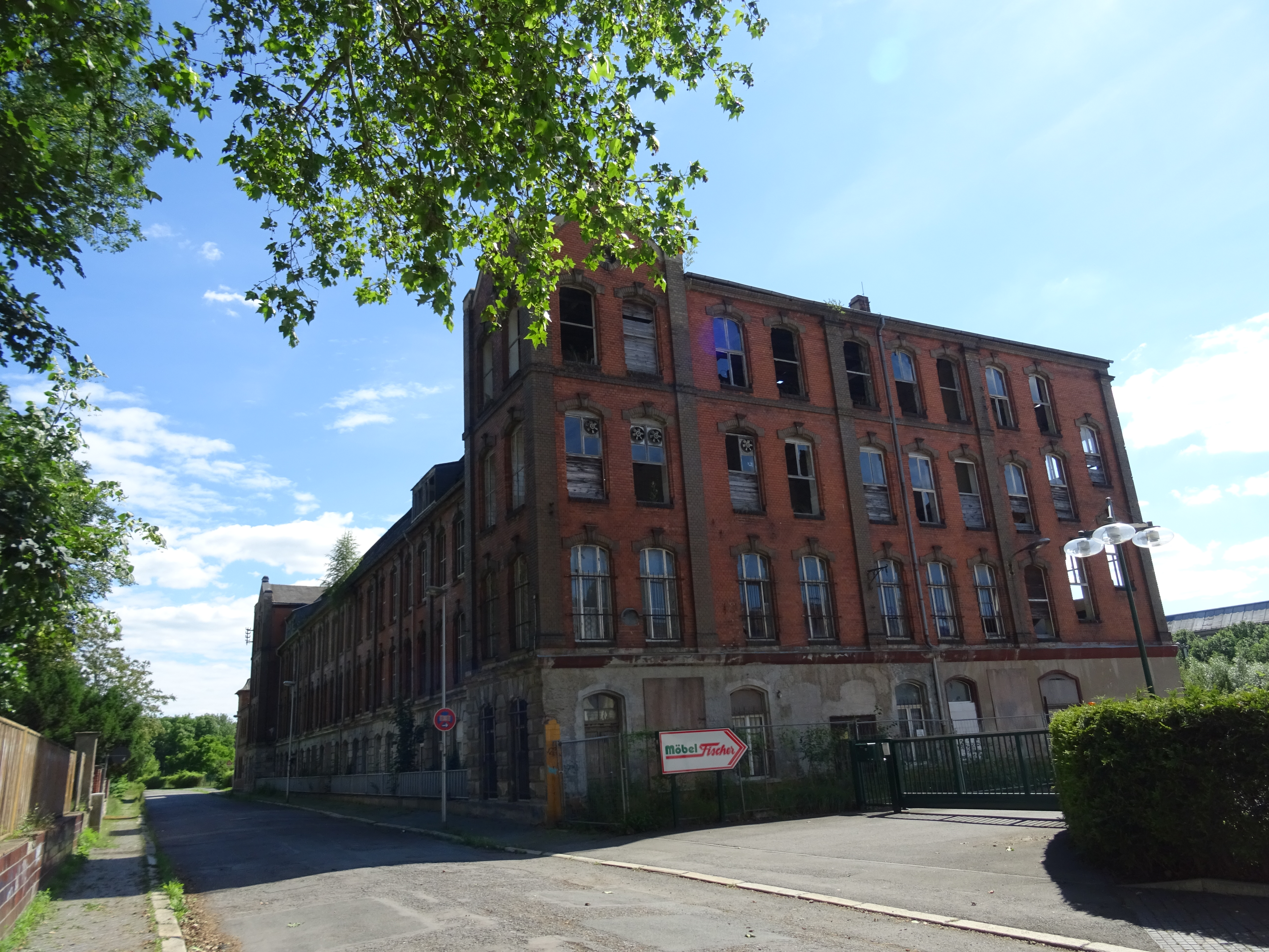 Gera, Geschwister-Scholl-Straße 24, Fabrik- und Verwaltungsgebäude, Hallen unter Sheddächern der ehemaligen Färberei- und Appreturanstalt Carl Louis Hirsch